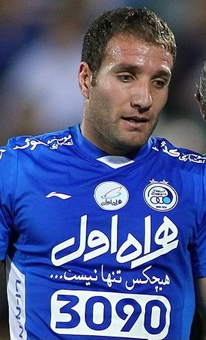 دیدار تیم های فوتبال استقلال تهران و ماشین سازی تبریز